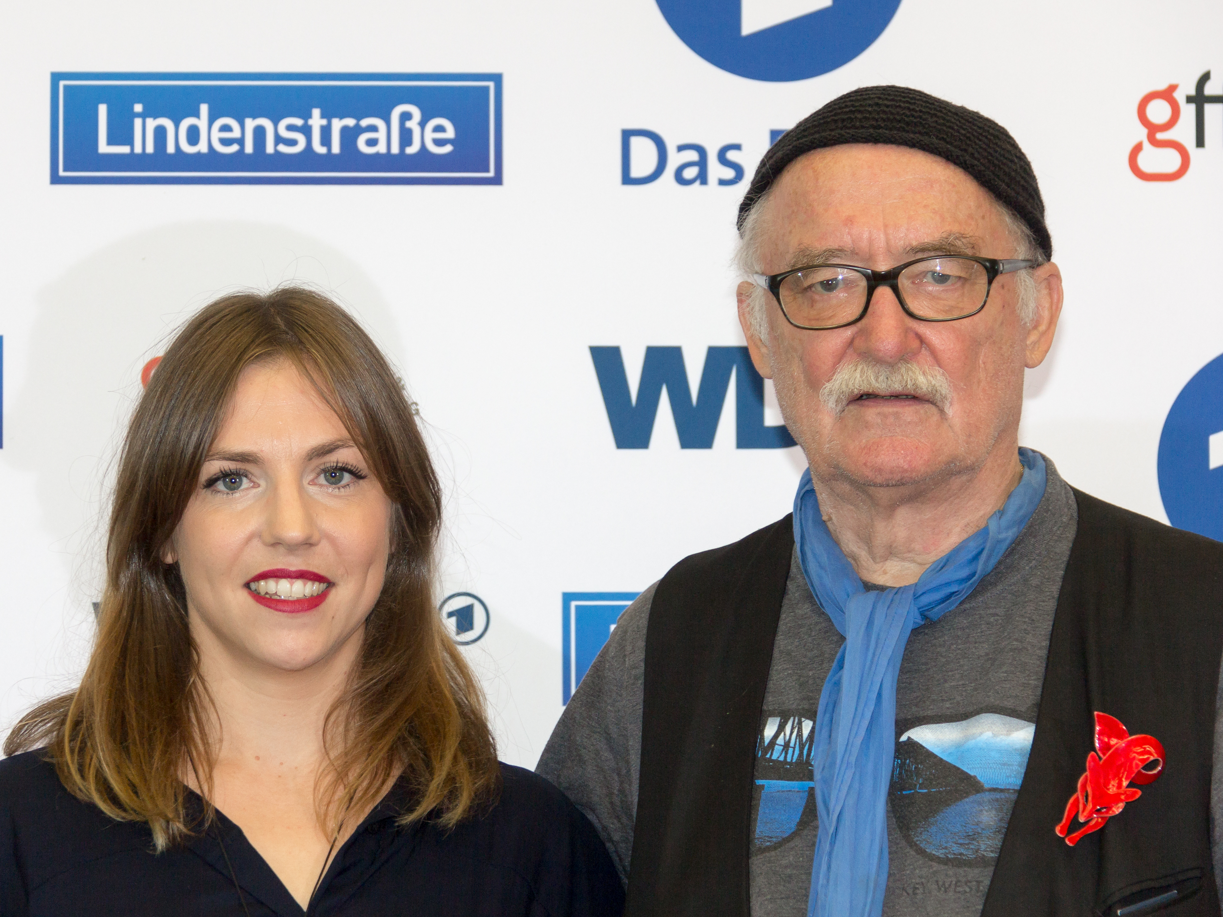 Pressetermin 30 Jahre Lindenstraße - Hans W. Geißendörfer und Hana Geißendörfer